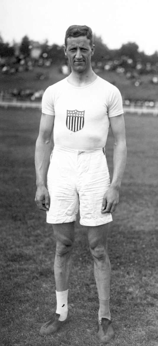 23-7-12, Reims, Platt Adams, américain, saut en hauteur [portrait] : [photographie de presse] / [Agence Rol]